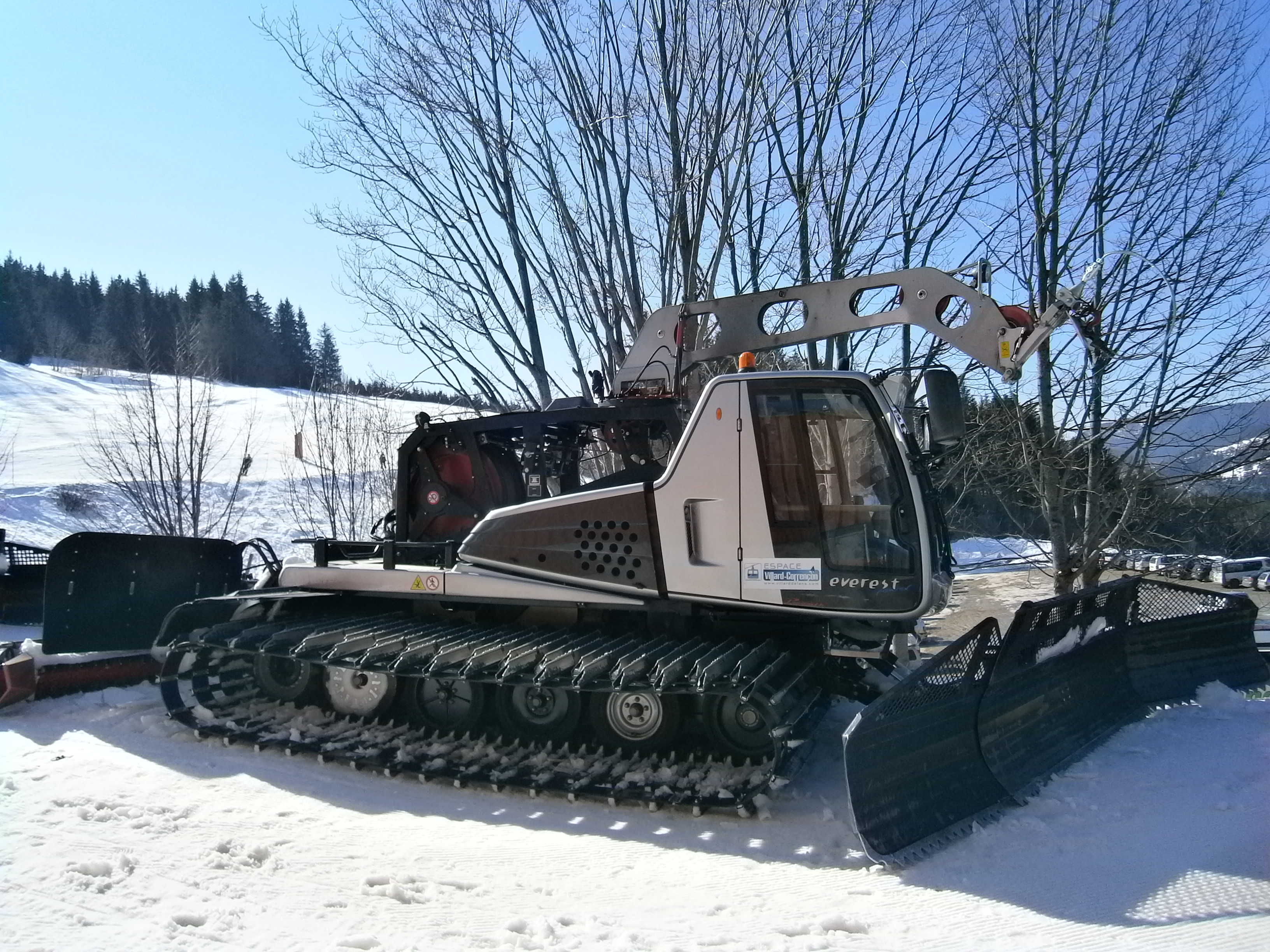 Espace Villard-Corrençon (38) : Une dameuse Prinoth Everest Power treuil, stationnées au Balcon de Villard.